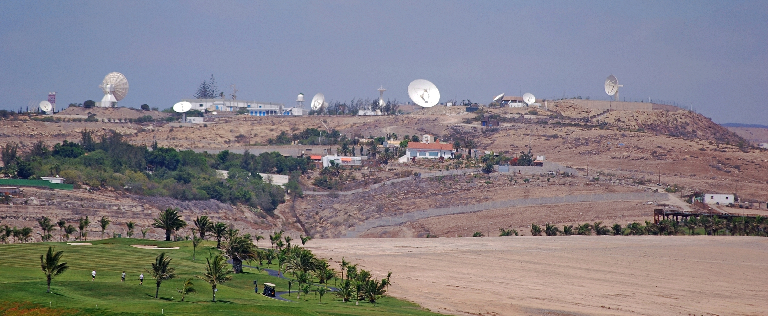 Erdfunkstelle nahe Maspalomas, Gran Canaria